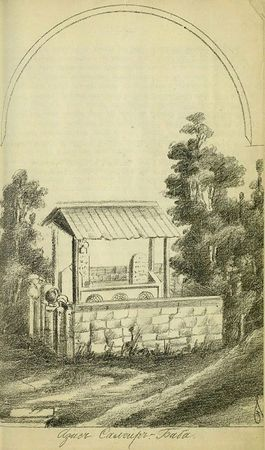 Азиз Салгир-Баба, рисунок Архипова из книги Лашкова Третья учебная экскурсия Симферопольской мужской гимназии, 1890